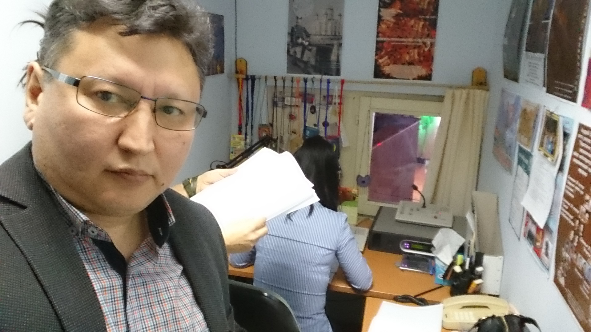 Саха тыла: Дьокуускайга Саха тылын уонна суругун-бичигин күнүн бэлиэтээһинтэн. 2015 сыл олунньу 13 күнэ